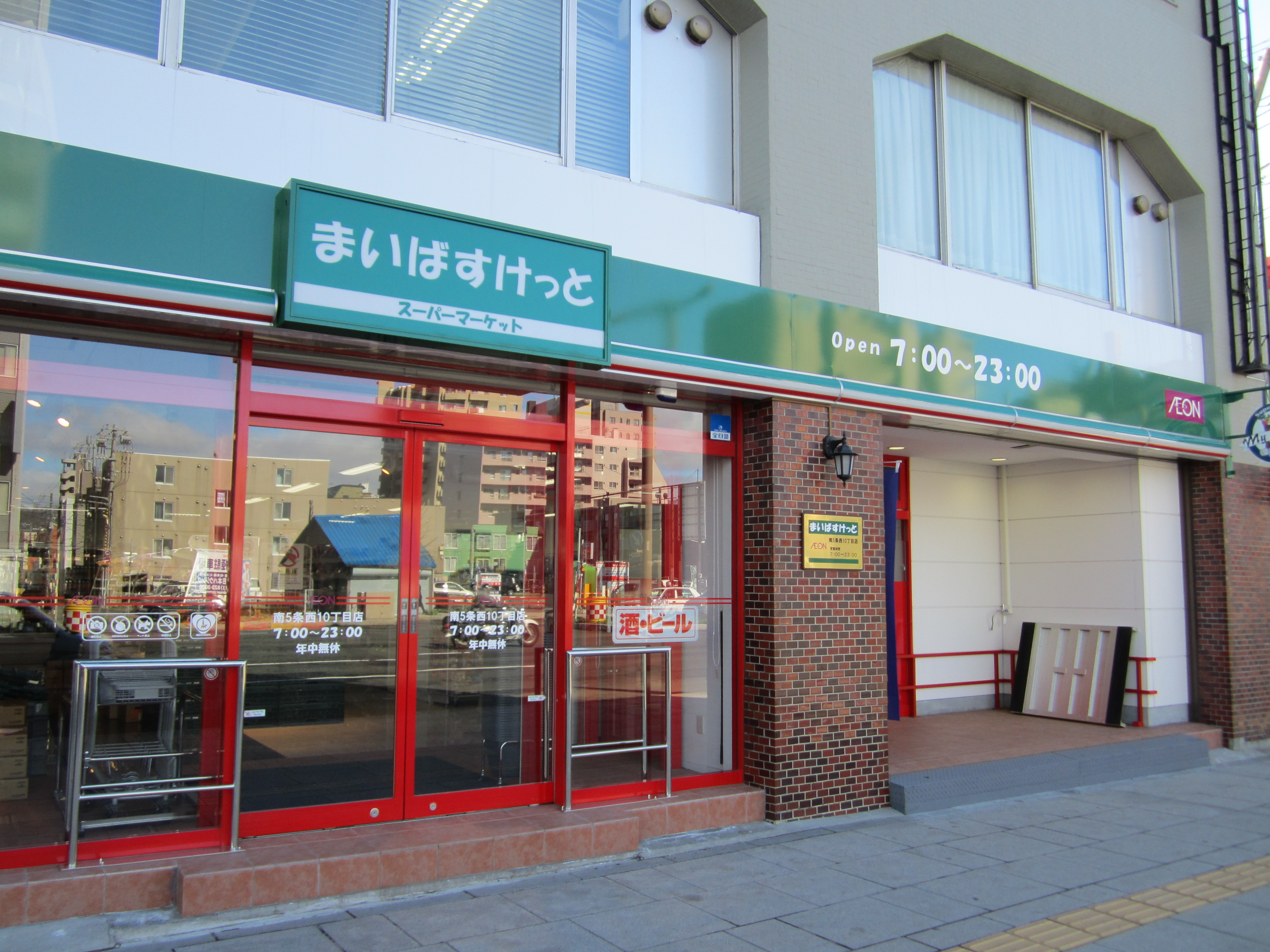 北海道1号店となる南5条西10丁目店（北海道札幌市中央区）